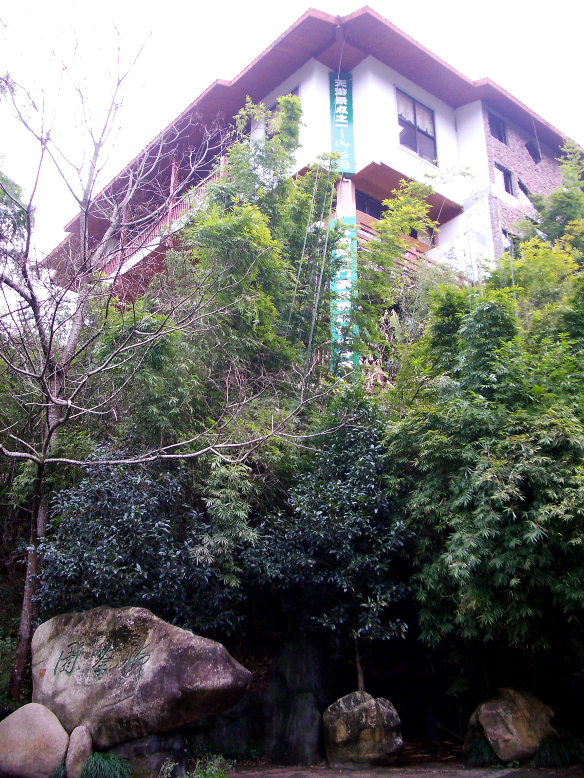 武夷山御茶園茶樓。我遊歷武夷山時所攝。